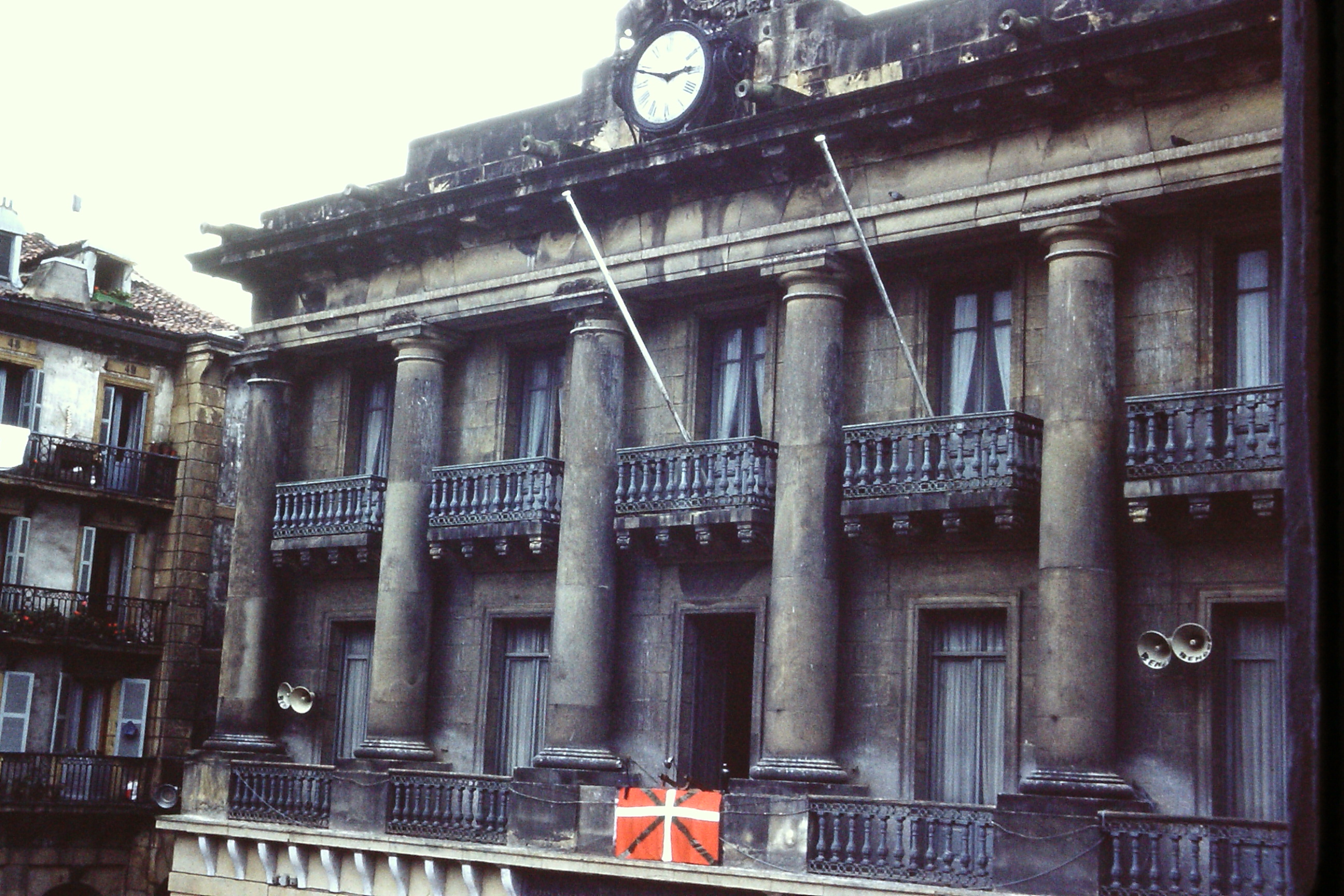 Ikurrina Donostiako Konstituzio plazan, Udaletxe Zaharrean, 1977ko urtarrilaren 19an (San Sebastian egunaren bezperan)